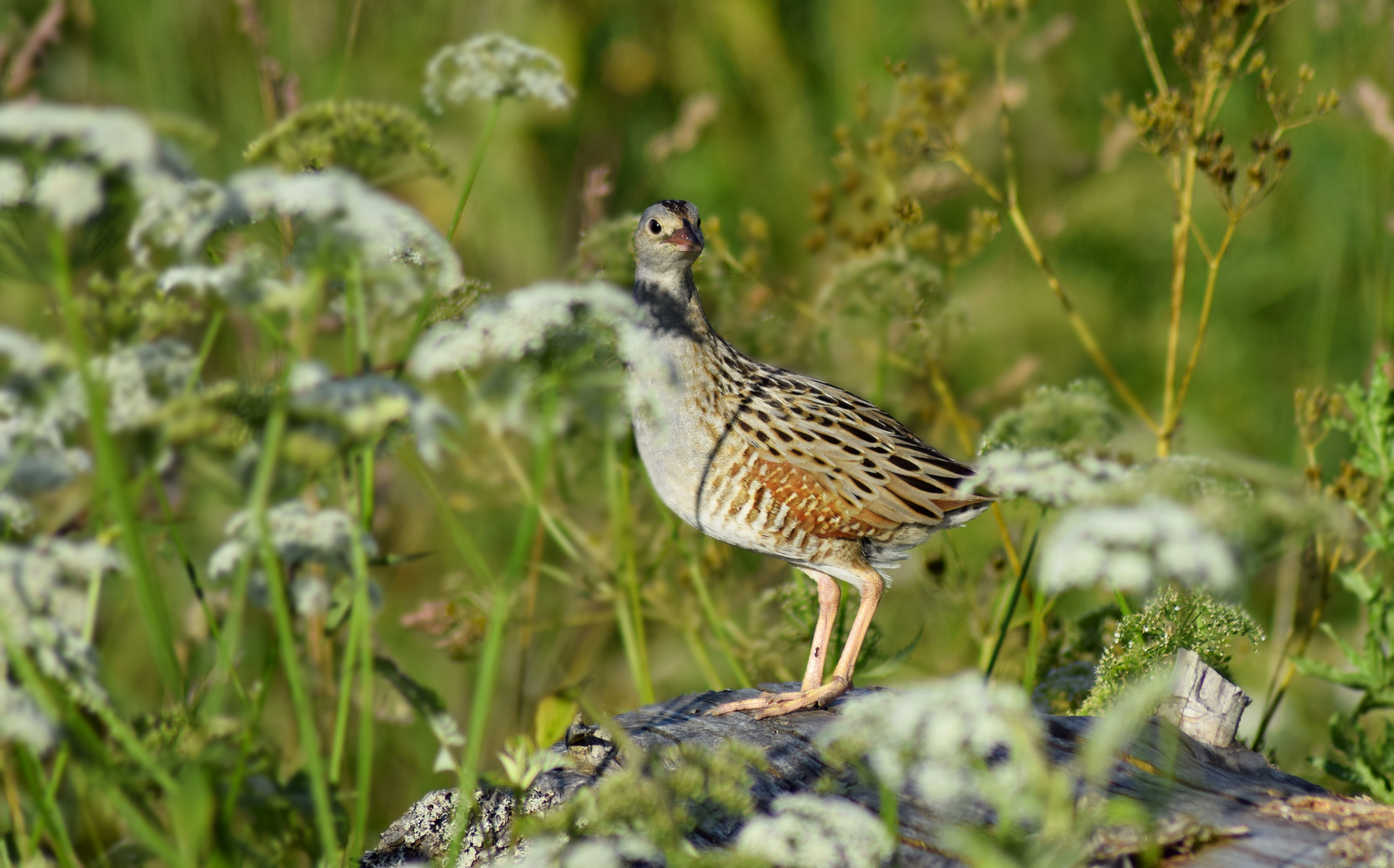 Pildil rukkirääk